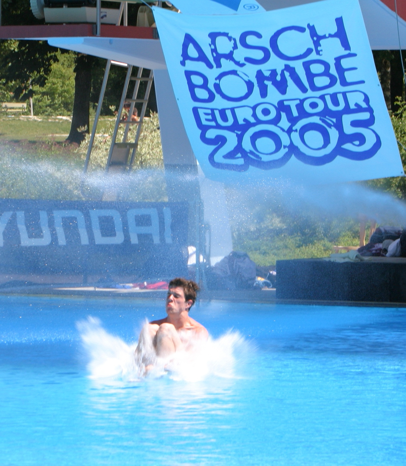 Ein Springer mit einer Arschbombe bei der Landung.